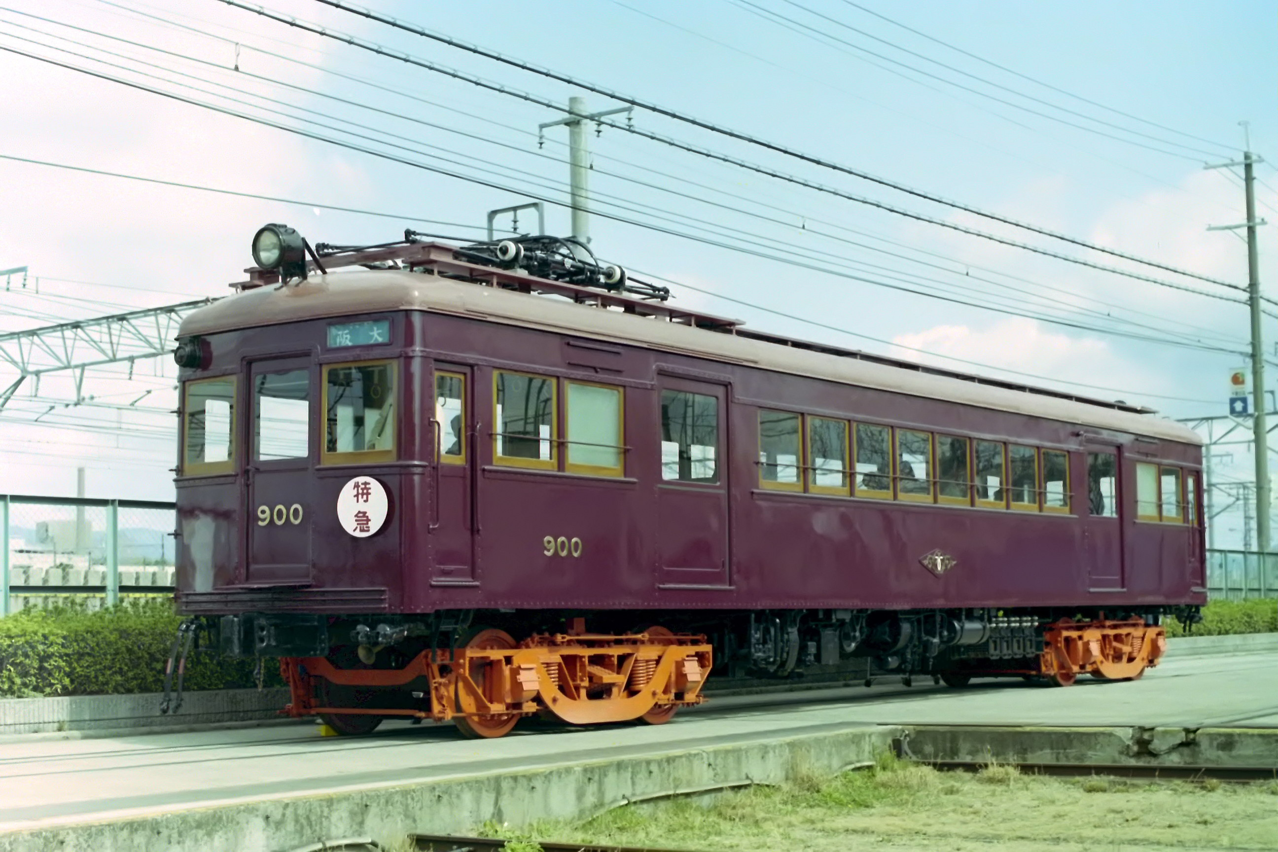 阪急900形保存車